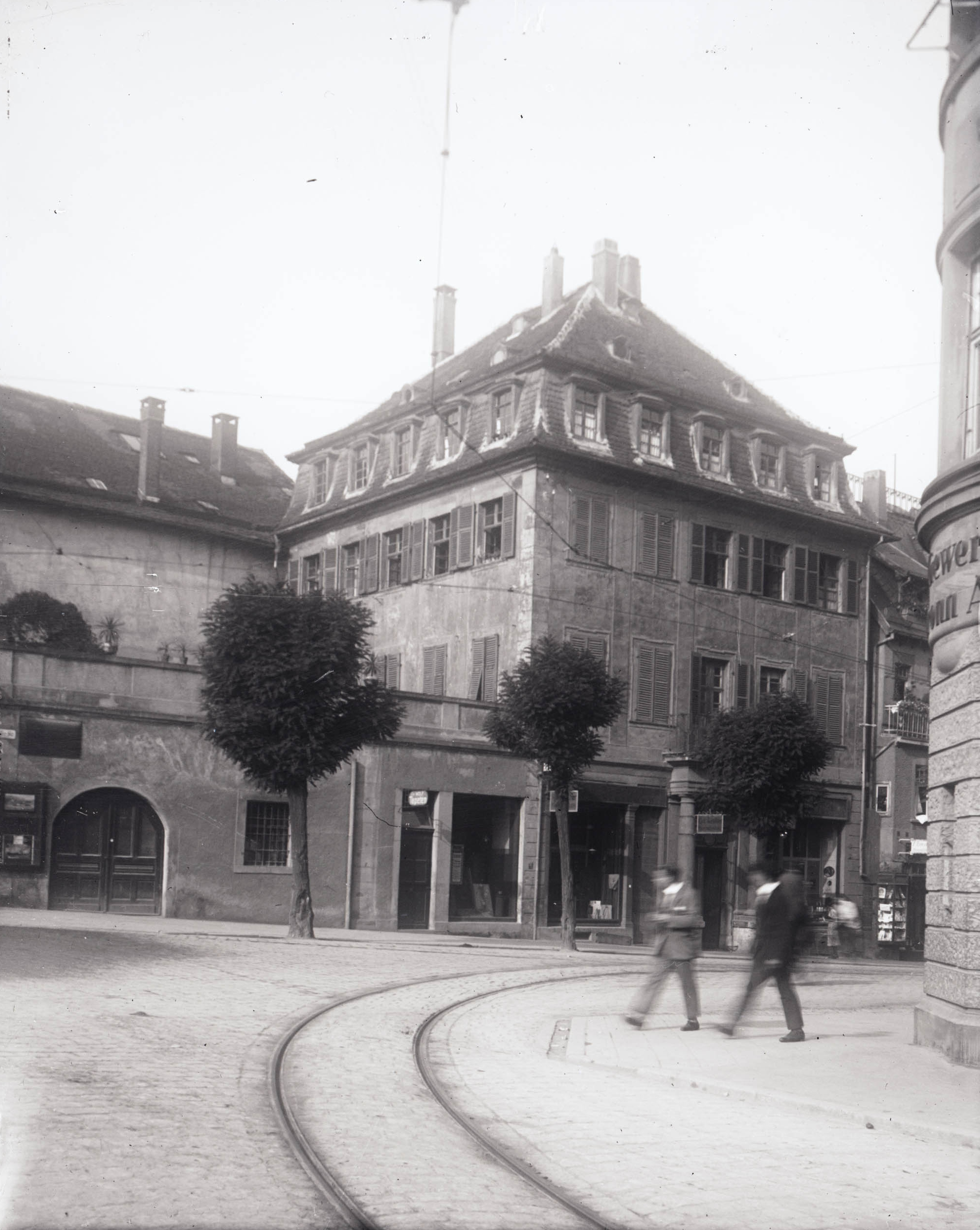 Das 1944 zerstörte Roßkampfsche Haus in Heilbronn